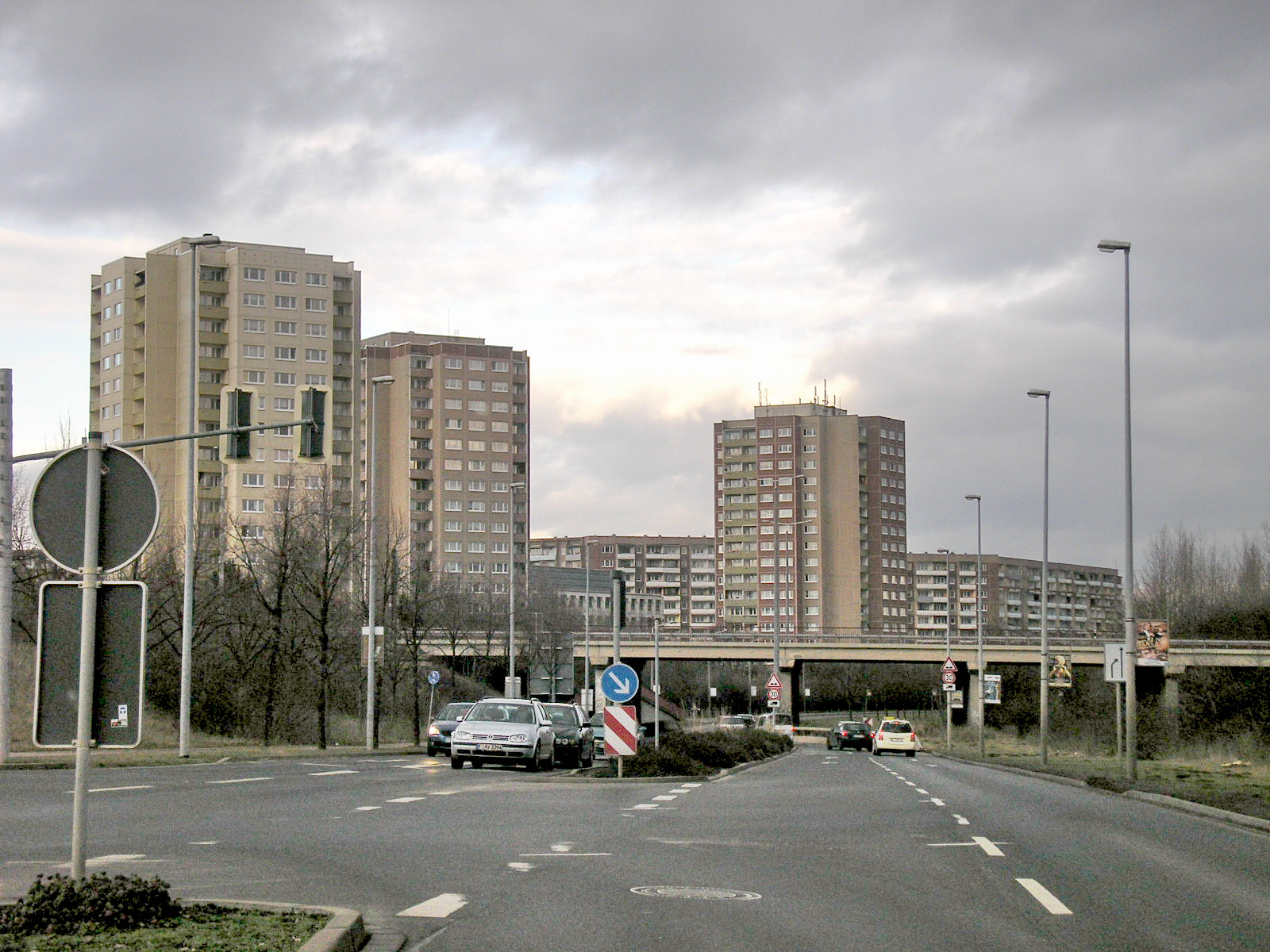 Blick von der Straße der Nationen auf den Südwesten des Wohngebiets Moskauer Platz in Erfurt.